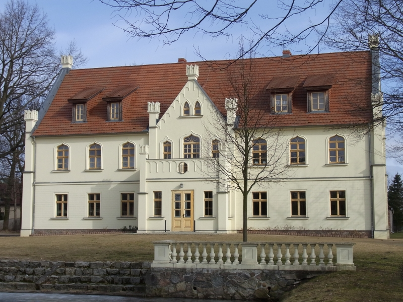 Gutshaus im Ensemble Parkanlage und Wirtschaftsgebäude